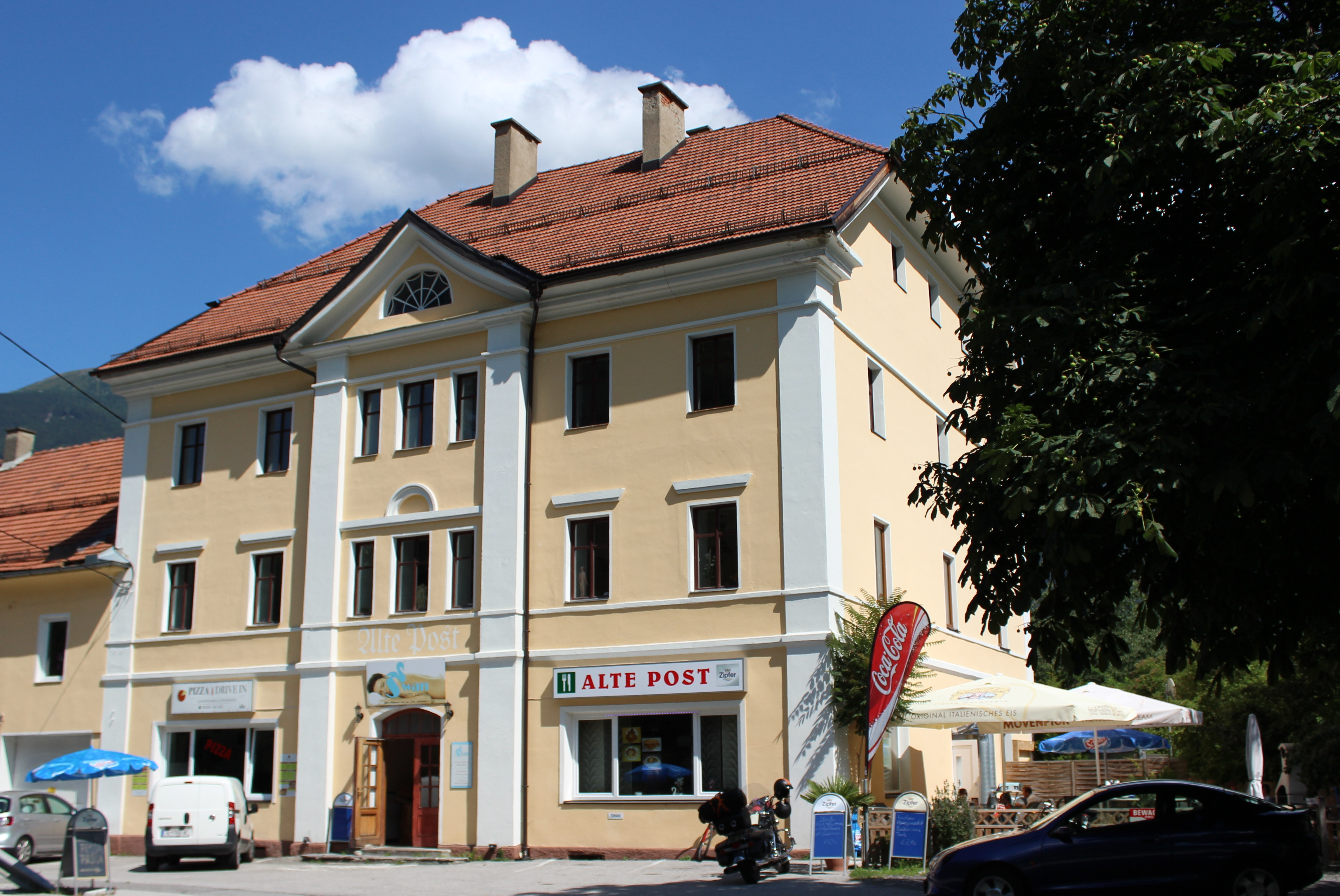 Das Gasthaus 'Alte Post' an der Brennerstraße in Schönberg im Stubaital. This media shows the remarkable cultural object in the Austrian state of Tyrol listed by the Tyrolean Art Cadastre with the ID 41729. (on tirisMaps, pdf, more images on Commons, Wikidata) Object location47° 11′ 07.41″ N, 11° 24′ 42.47″ E